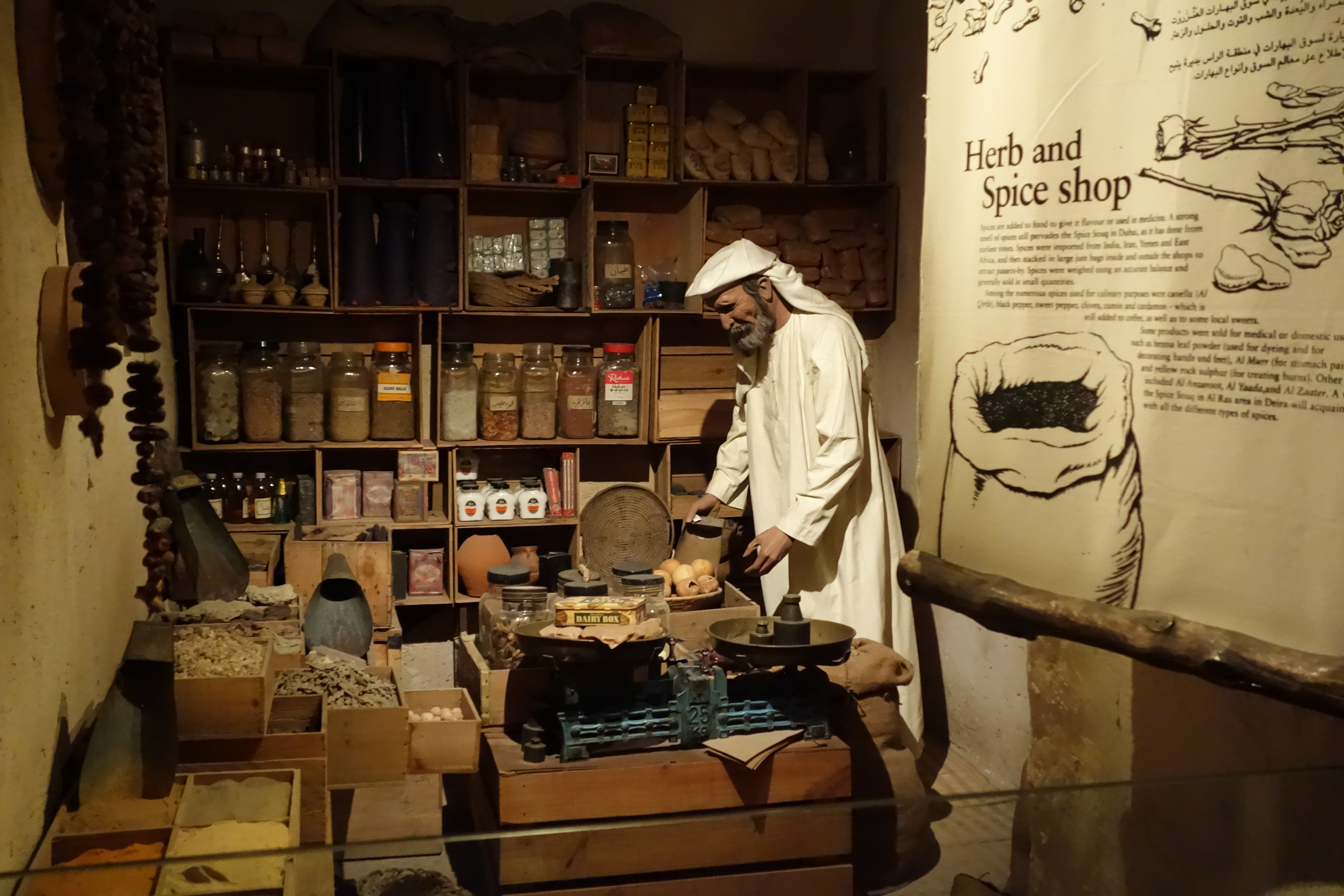 Dubai Museum